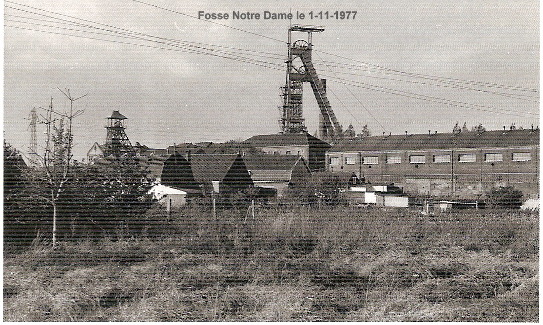 Ancienne Fosse Notre Dame à Waziers aujourd'hui disparue